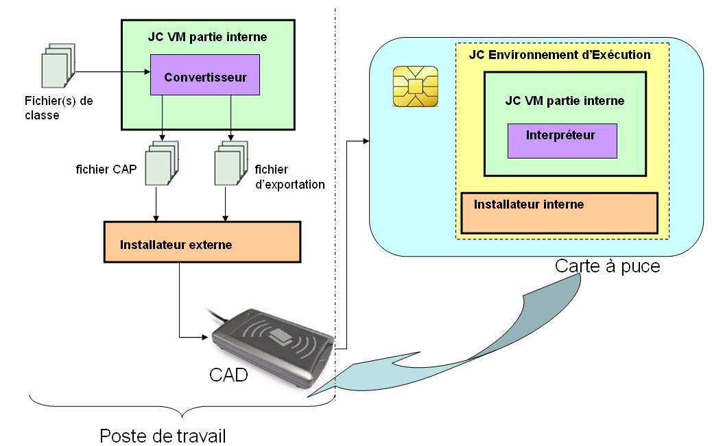 javacard-CAD